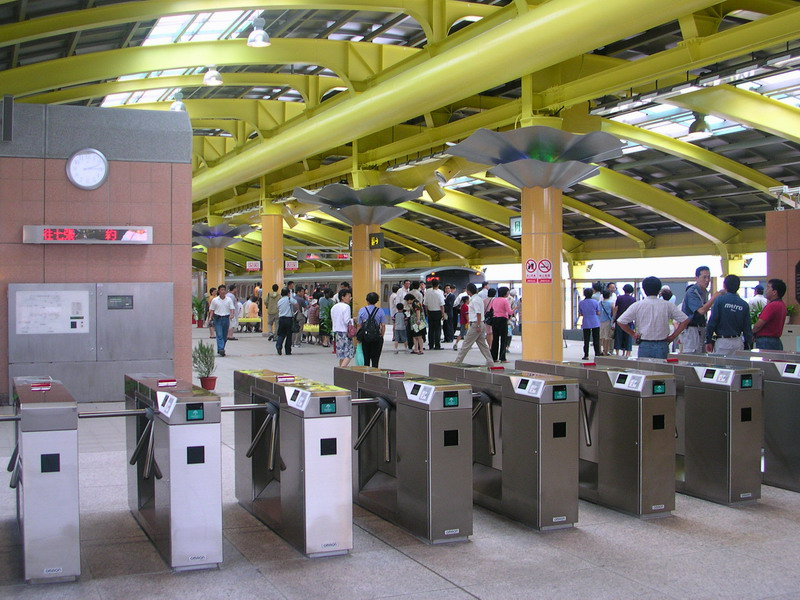 臺北捷運小碧潭站首班試乘會照片。